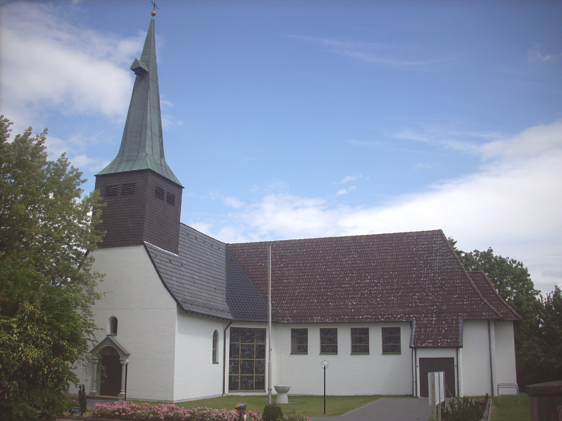 Kath. Kirche St. Martin, Giesen, Landkreis Hildesheim